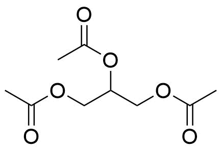 glyserolitriasetaatti